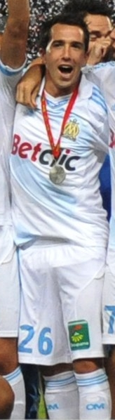 Jean-Philippe Sabo sous le maillot de l'Olympique de Marseille vainqueur du Trophée des champions 2011, contre le Lille OSC.